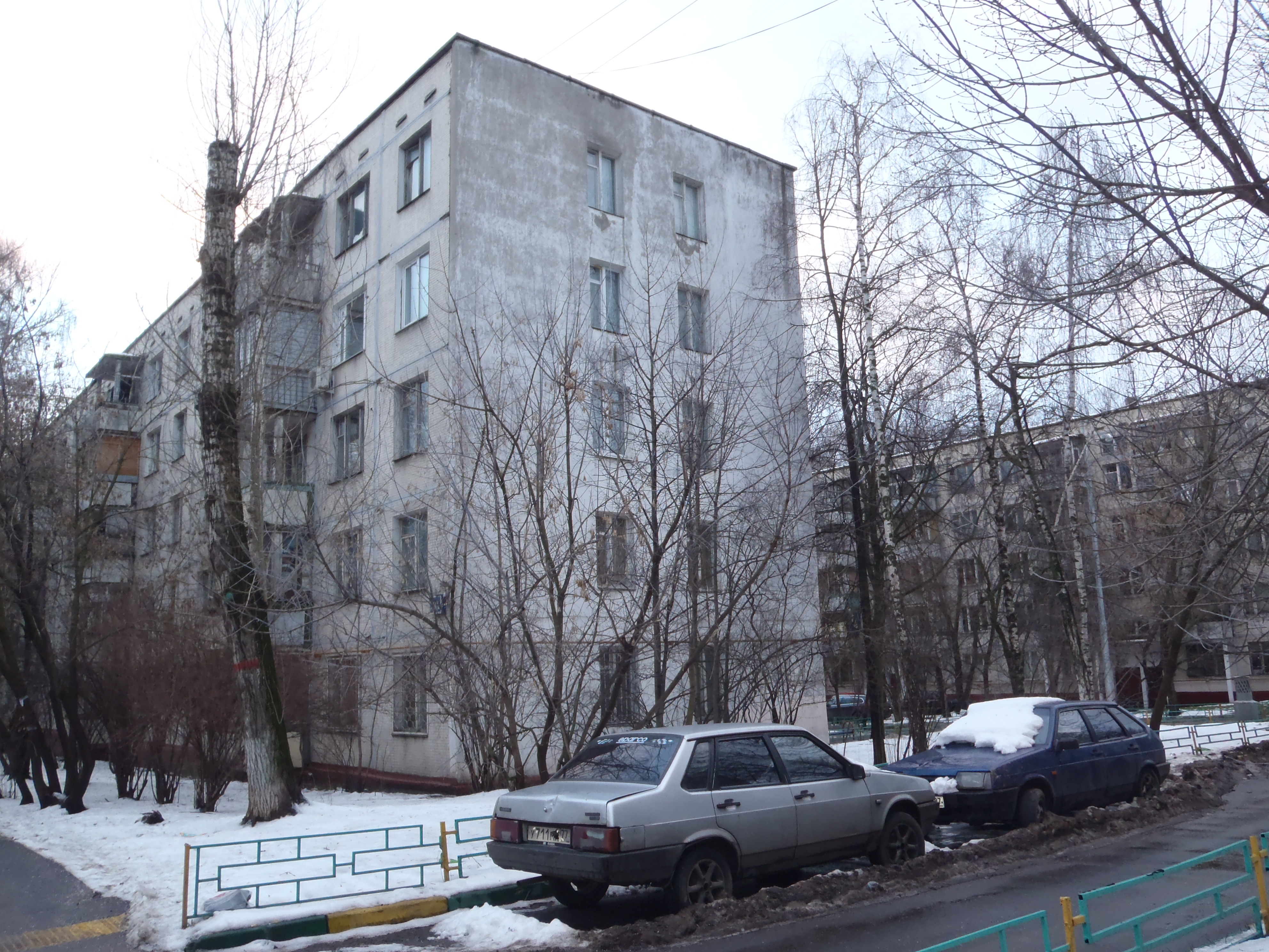 Два дома серии II-32 по адресу улица Генерала Глаголева 5к1 и 5к2.